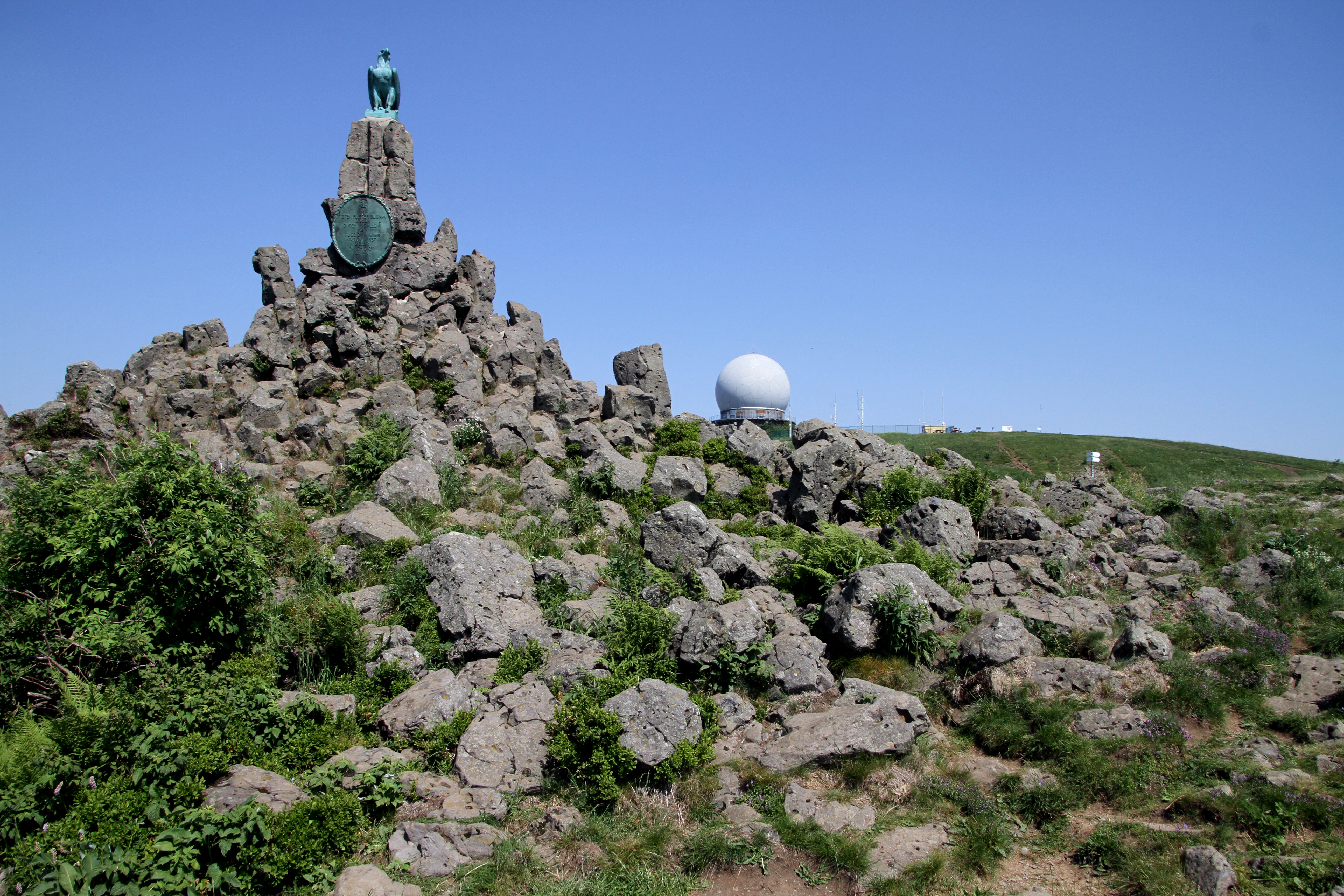 Wasserkuppe in der Rhön in Hessen